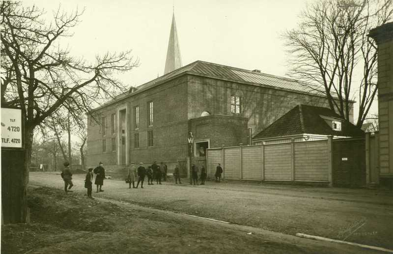 Trondheim Kunstmuseum